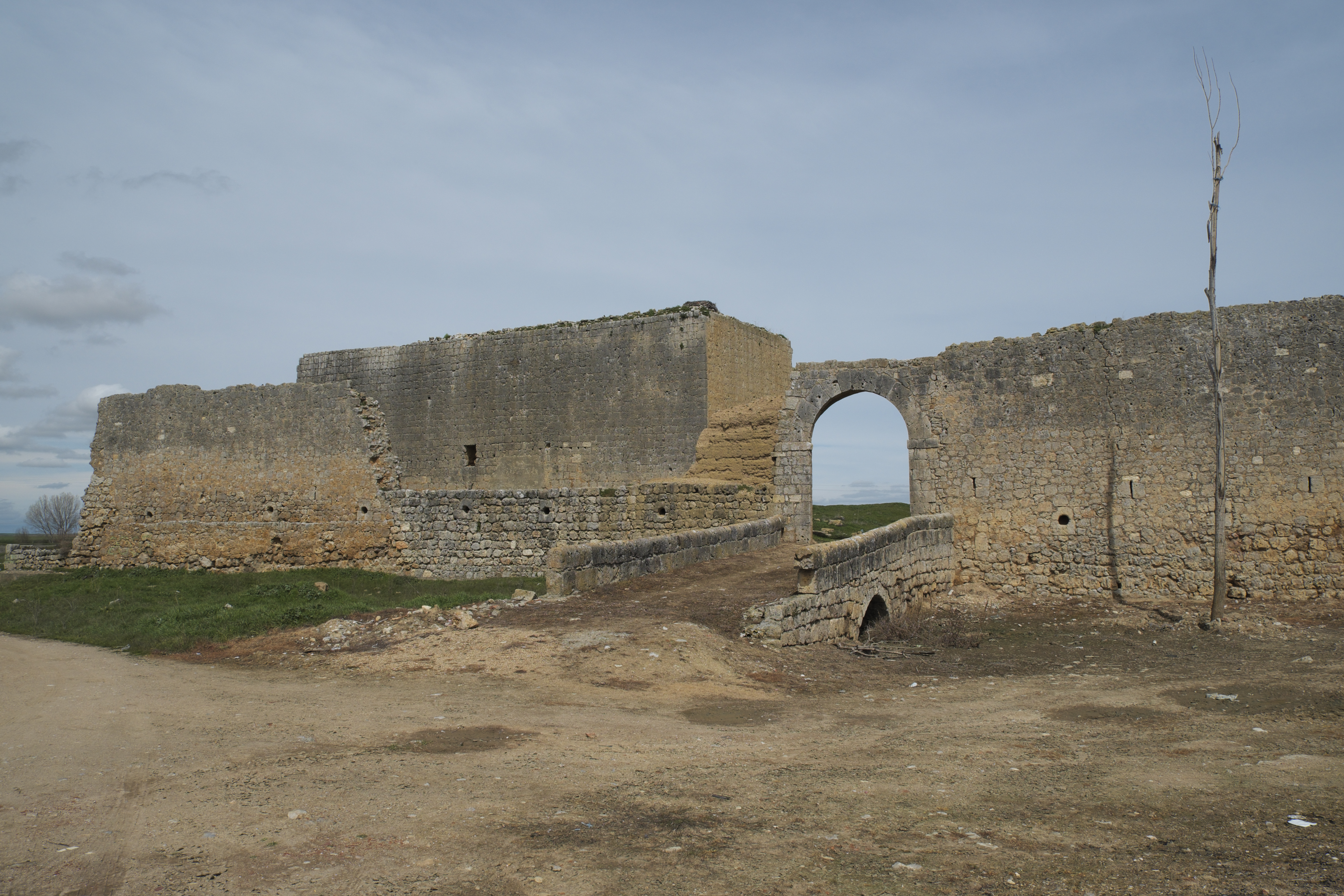 Castillo de Villagarcía de Campos, Palacio de los Quijada, in Villagarcía de Campos in der Provinz Valladolid (Kastilien-León/Spanien), Burgruine